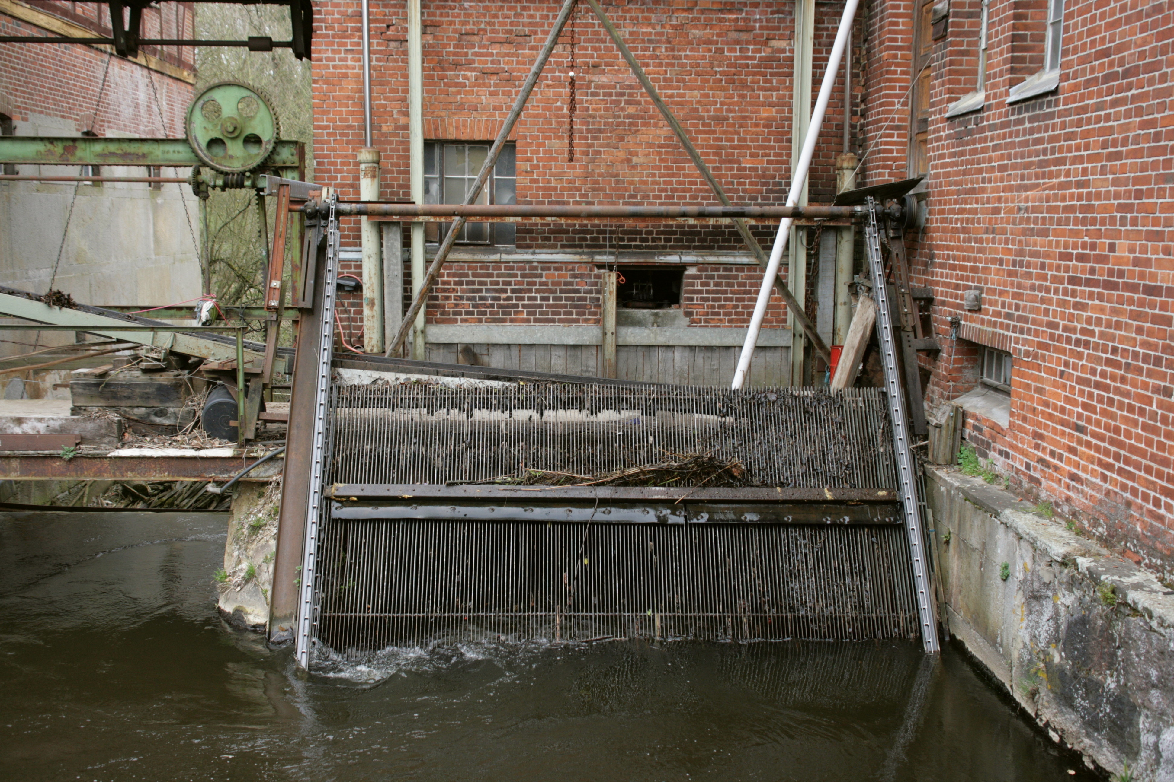 Wassermühle, Mühlenstraße in Medingen, Bad Bevensen